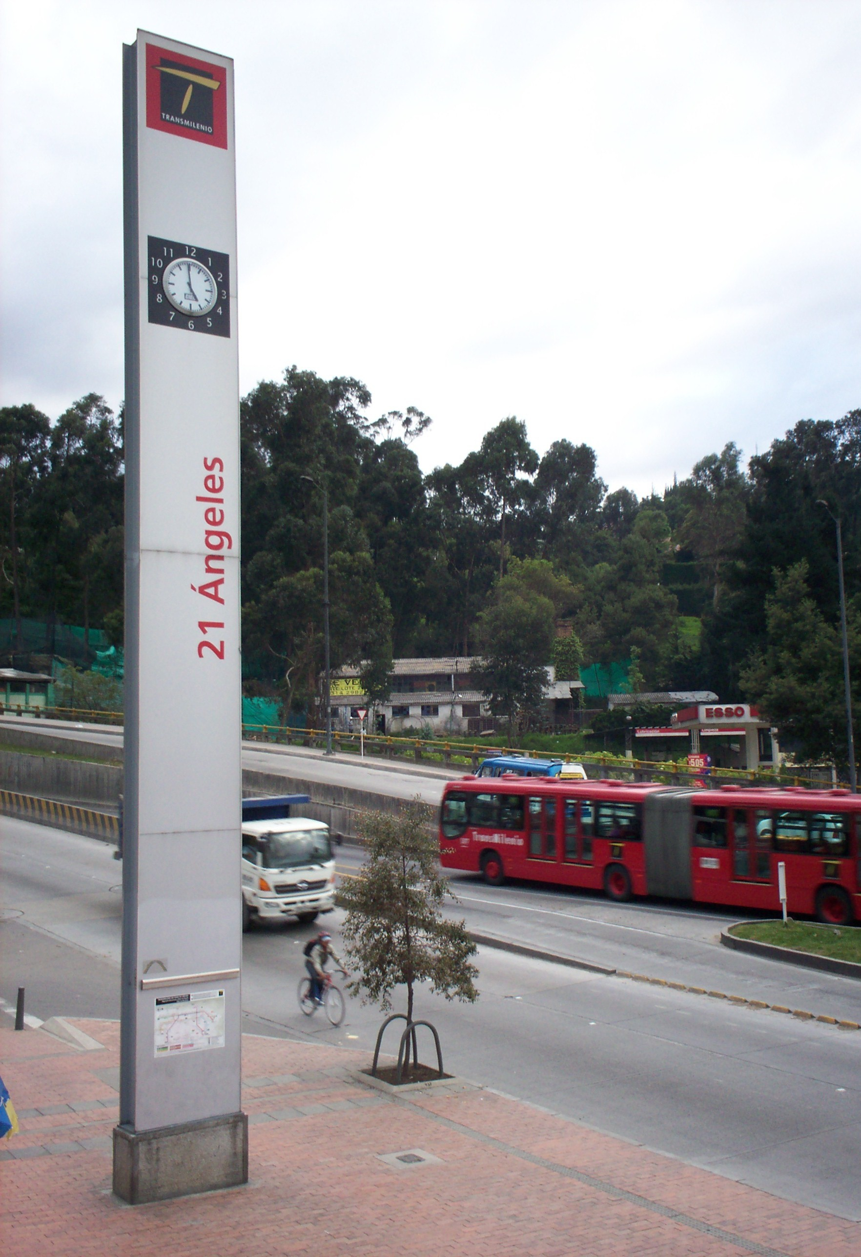 Tótem de la estación 21 Ángeles del sistema TransMilenio en Bogotá.